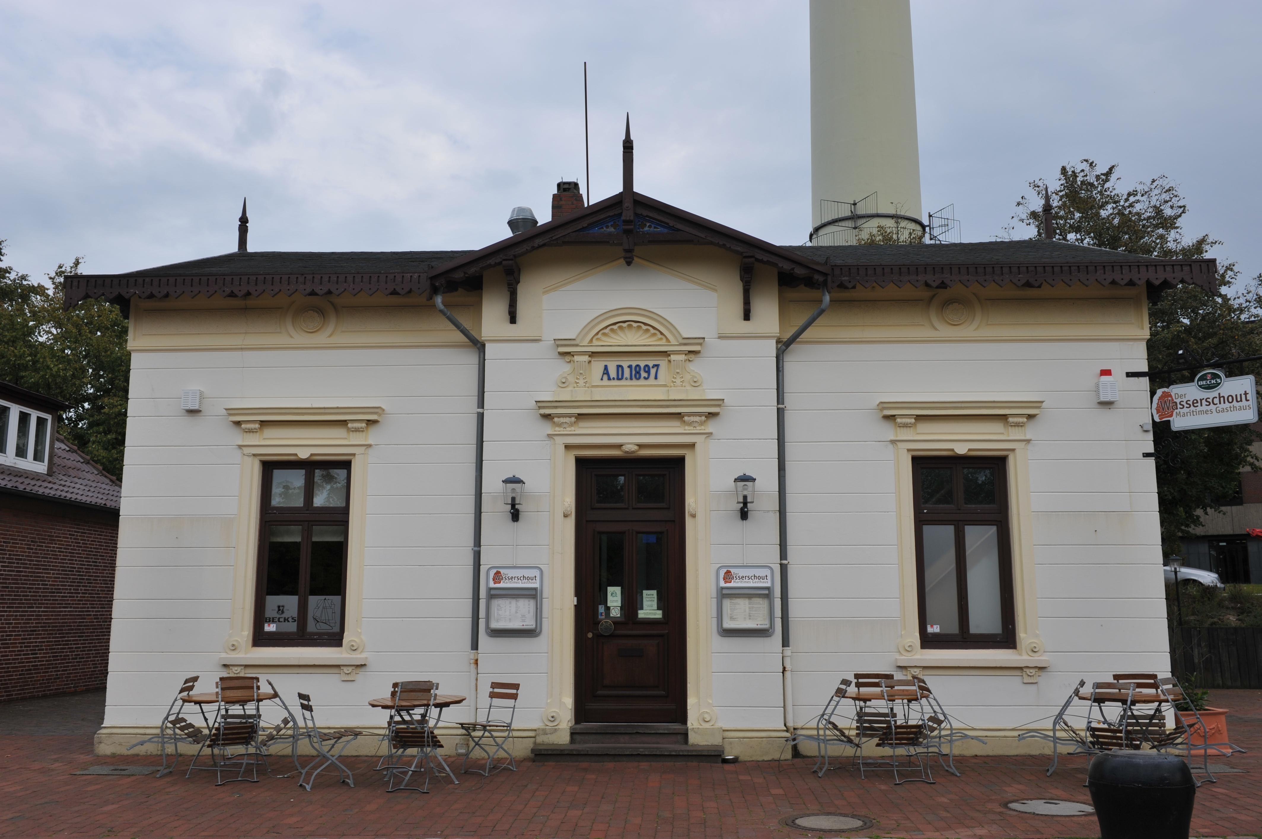 Historical building in Bremerhaven, northern Germany Schleusenwärterhaus, van-Ronzelen-Straße 4, 1897 Das abgebildete Objekt ist ein geschütztes Kulturdenkmal in der Freien Hansestadt Bremen, mit der Nr. 1551 beim Landesamt für Denkmalpflege registriert.